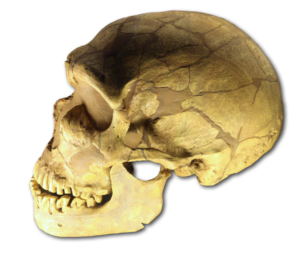 moulage du crâne d' Homo neanderthalensis de La Ferrassie, vitrine du Musée de l'Homme, Paris